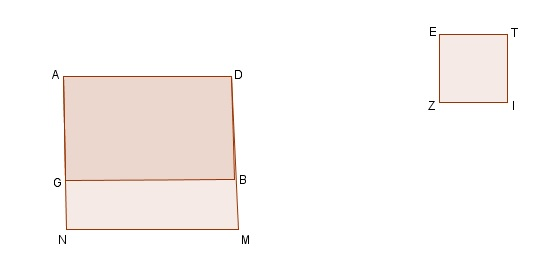 Il·lustració d'una de les proposiciones de les Data d'Euclides